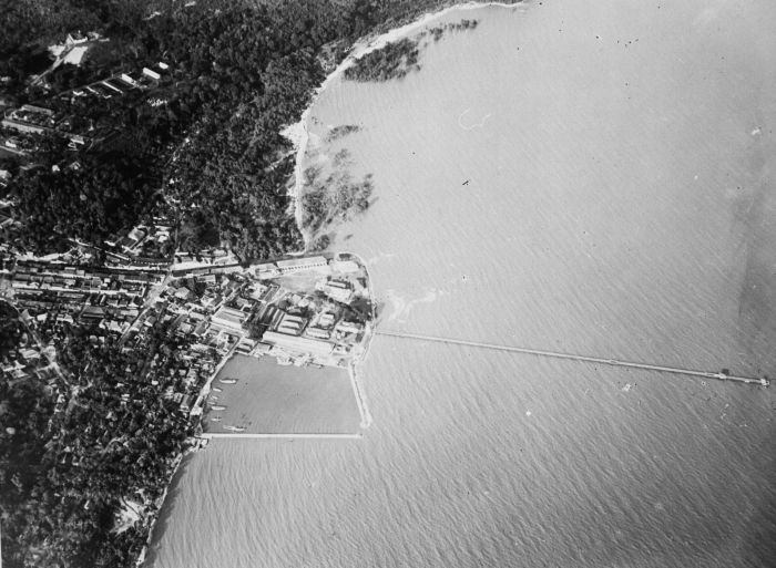 Foto. Luchtfoto van de haven van Pekalongan